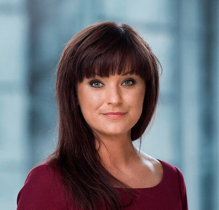 Pressefoto af Sophie Løhde